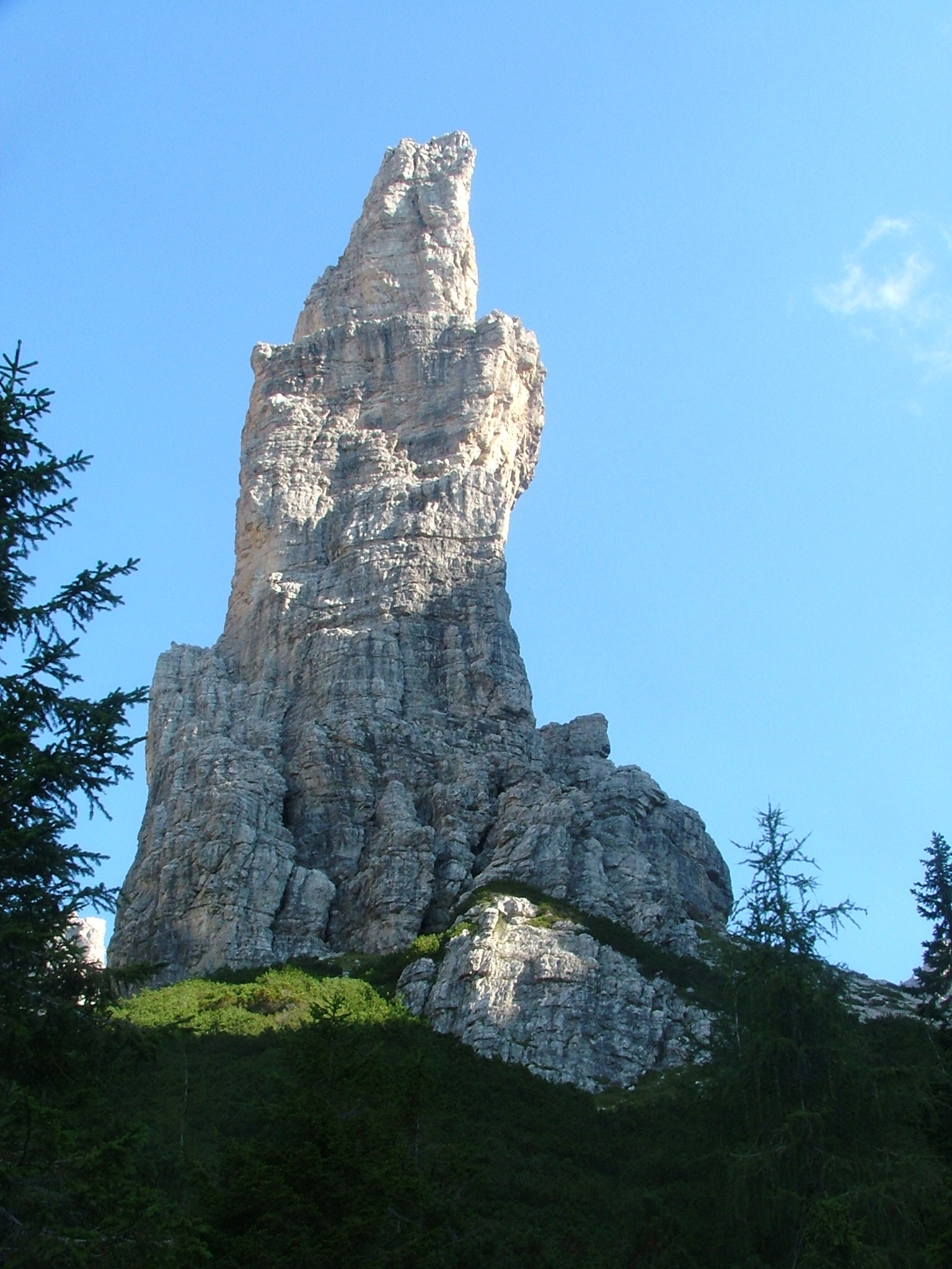 Campanile di Montanaia, Cimolais, Pordenone, Italy